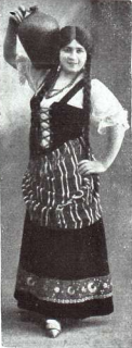 Aurora Janffret, «La Goya» en la revista Caras y Caretas 23/05/1914, n. 816, página 62.